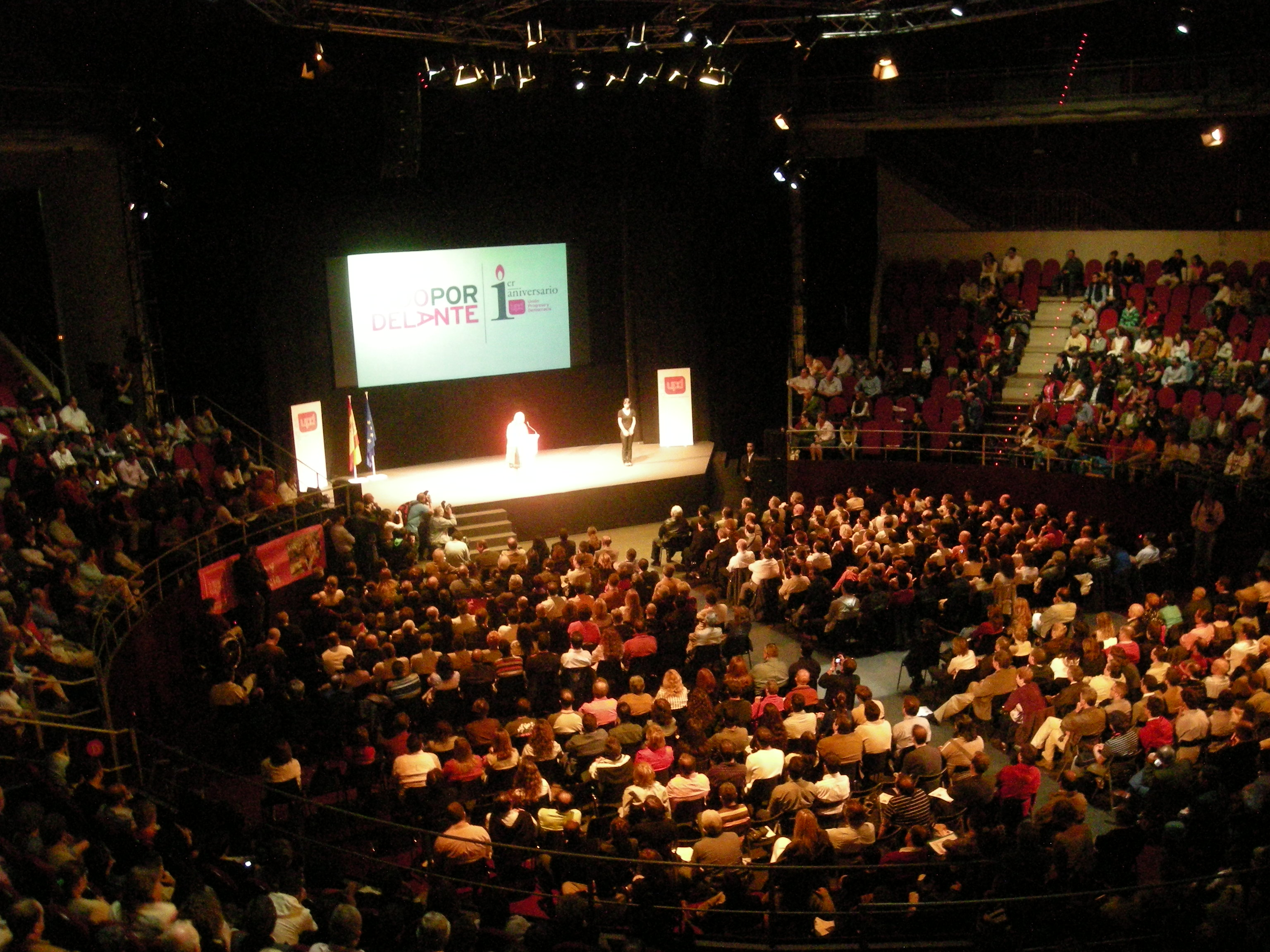 Acto de I Aniversario de UPyD en el Circo Price, Madrid